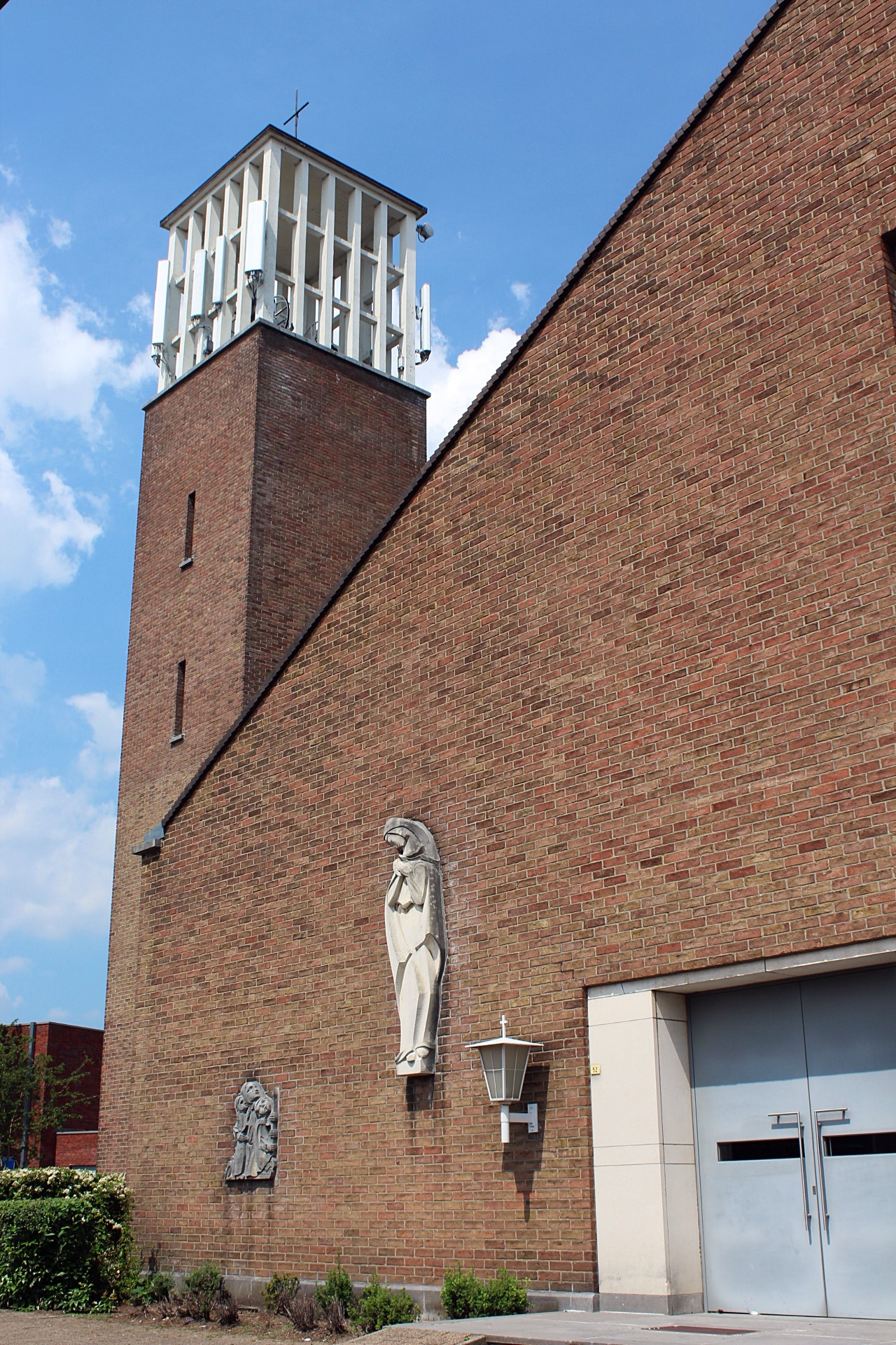 Zicht op de toren en de hoofdingang van de Onze-Lieve-Vrouw van Fatimakerk (Gijmel).